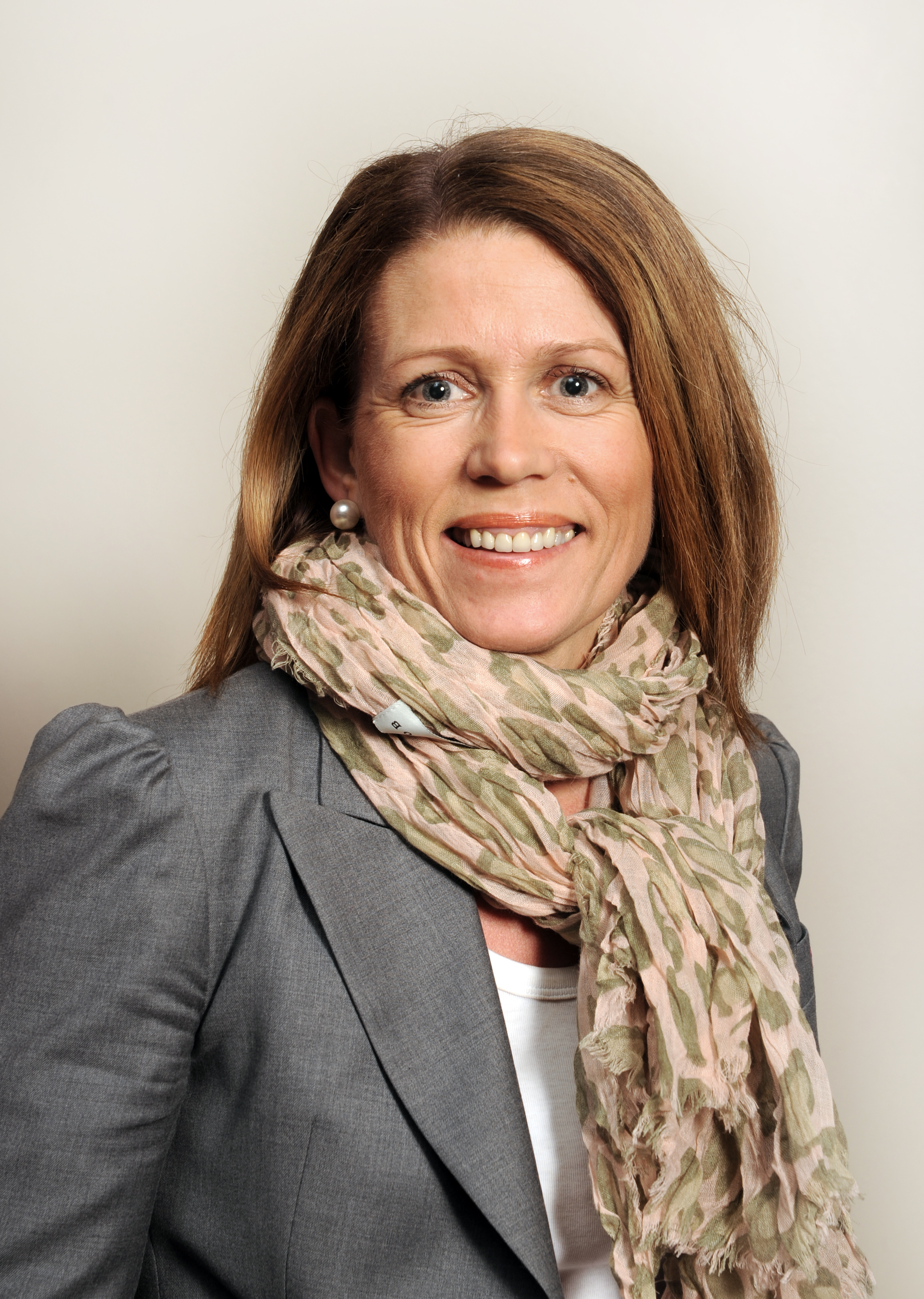 Randi Lillegård (1962) er ordfører (AP) i Dyrøy